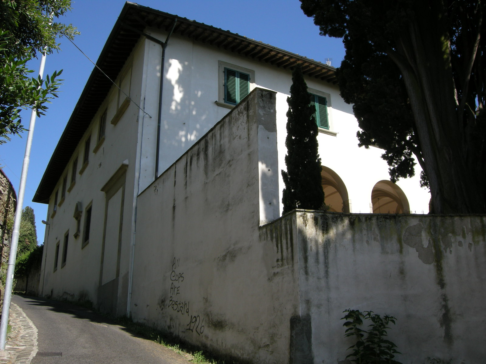 Villa Medici di Fiesole, esterno